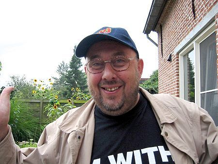 Persfoto Van Dam 1 2003 Peter_van_Dam (dj)